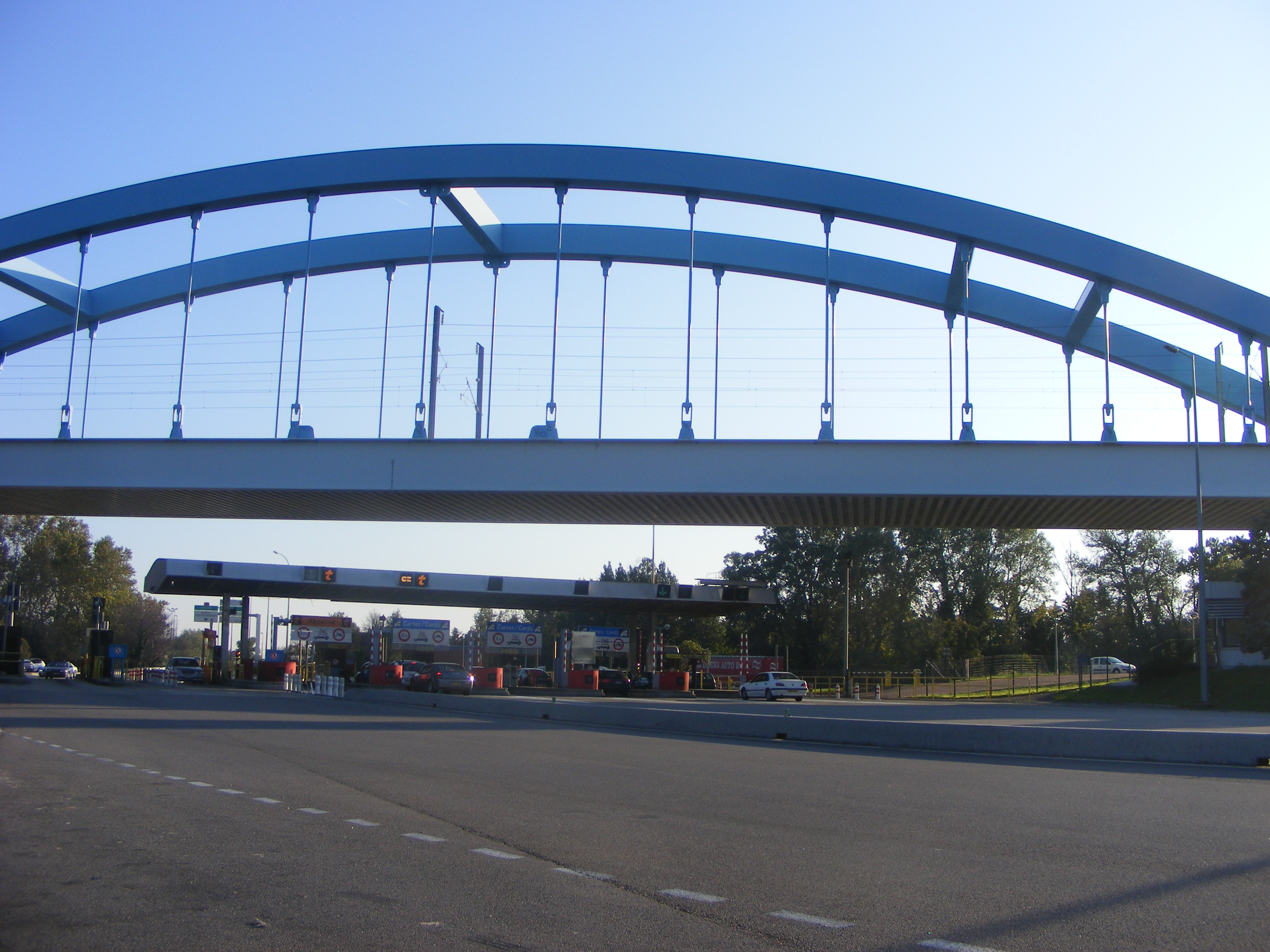 Péage d'Avignon Sud (Sortie 24) sur l'A7 avec la LGV Méditerranée au dessus